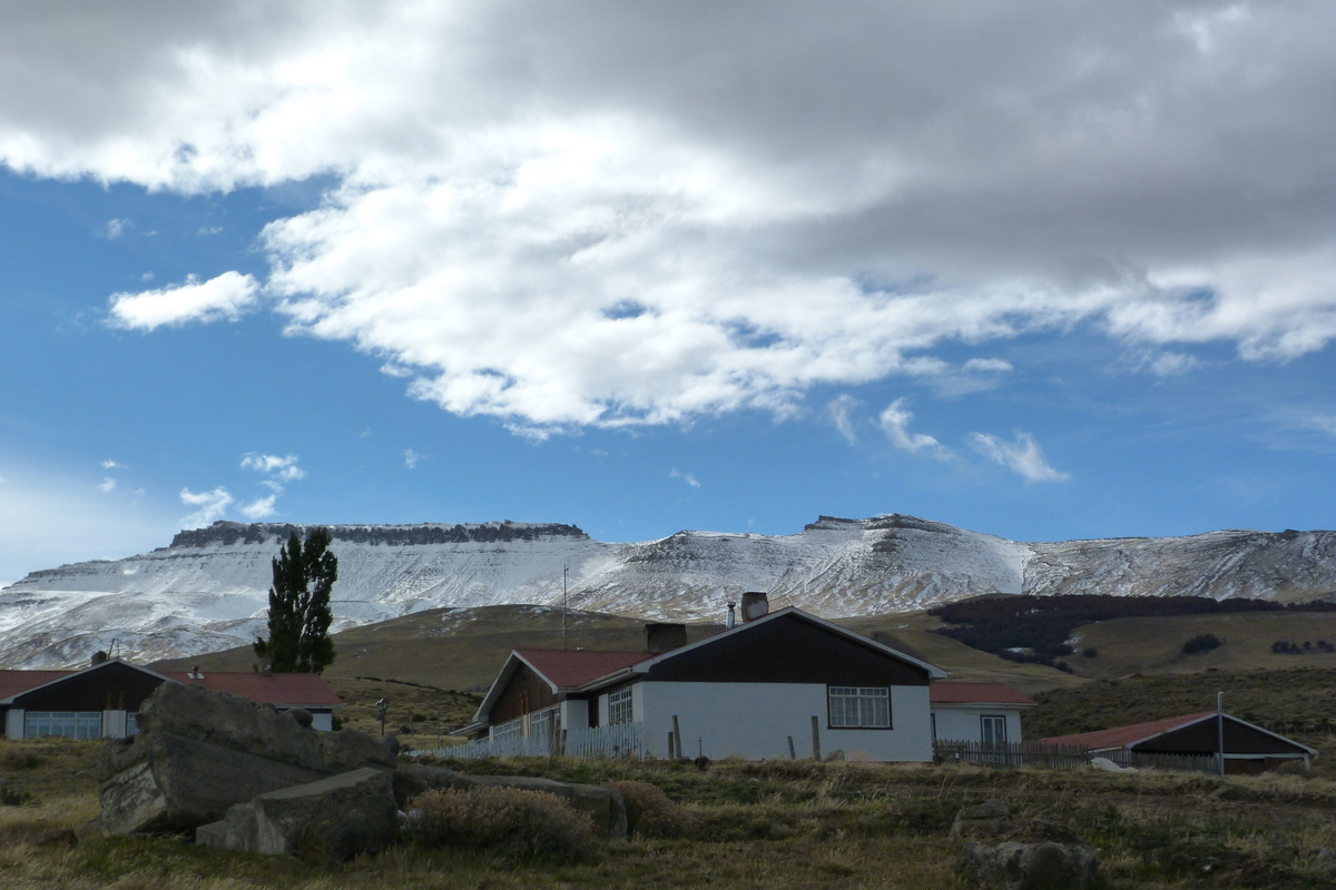 Cerro Guido - ©Gonzalo Baeza